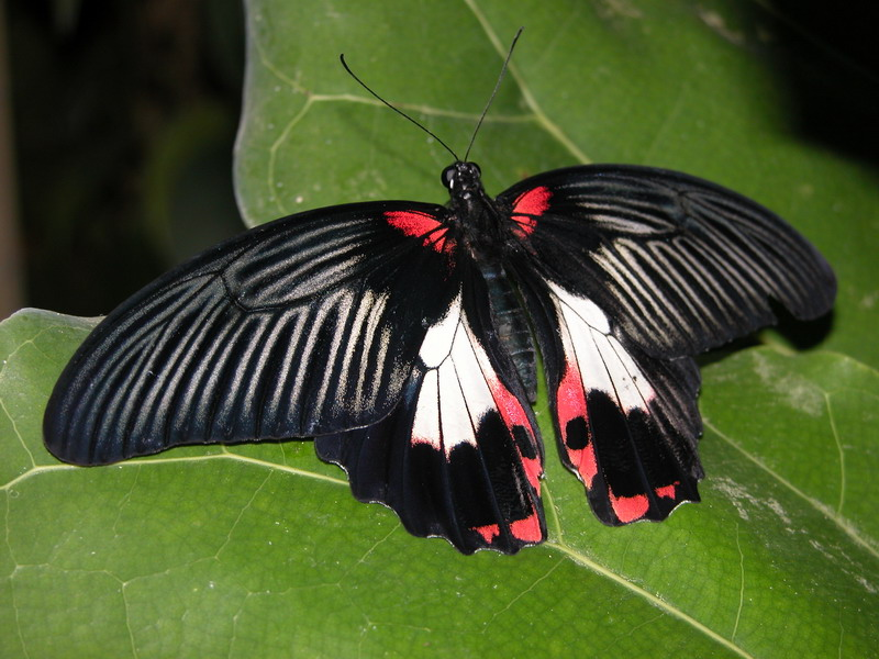 Бабочка Парусник Румянцева